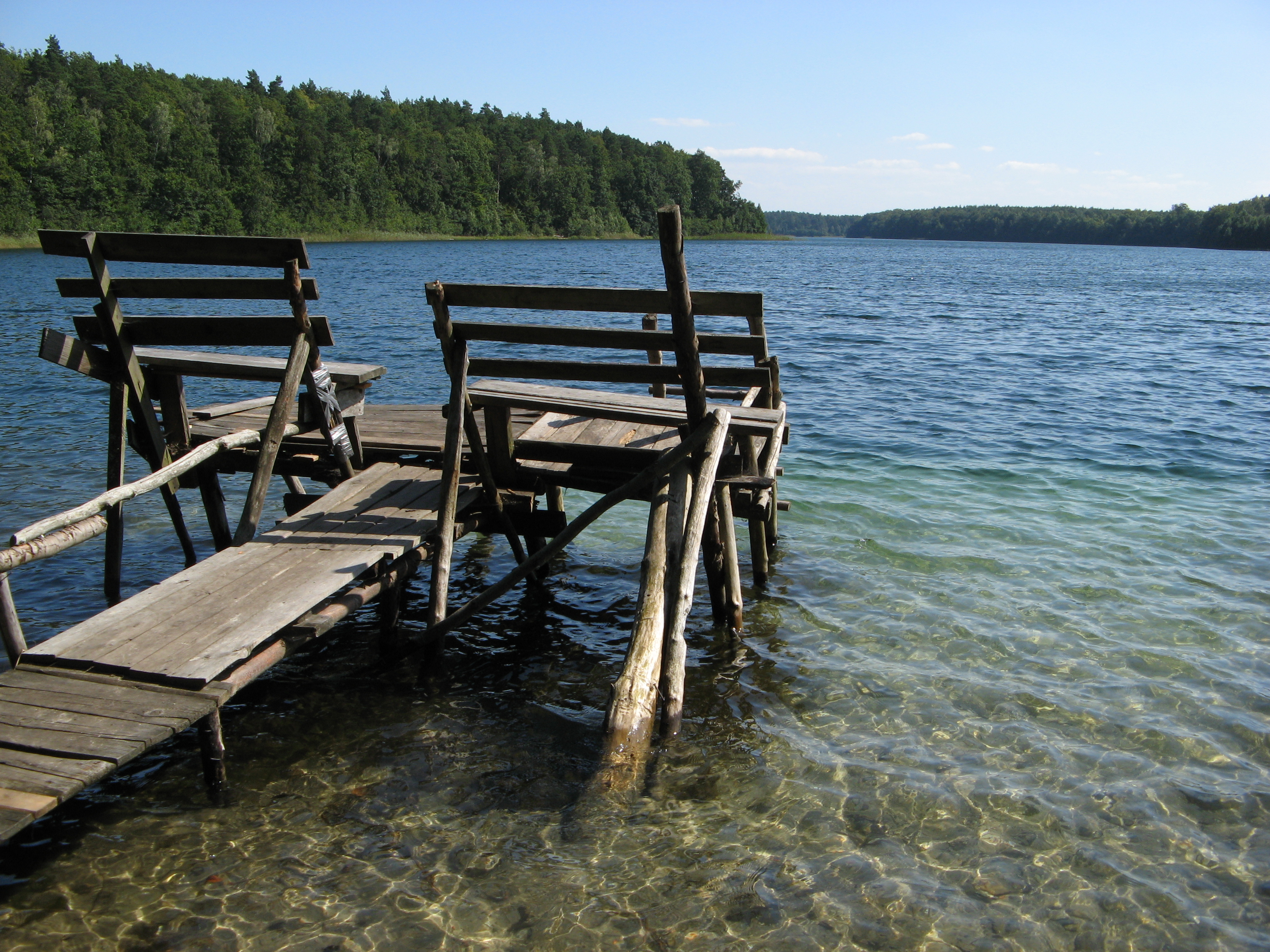 Jezioro Krzemno